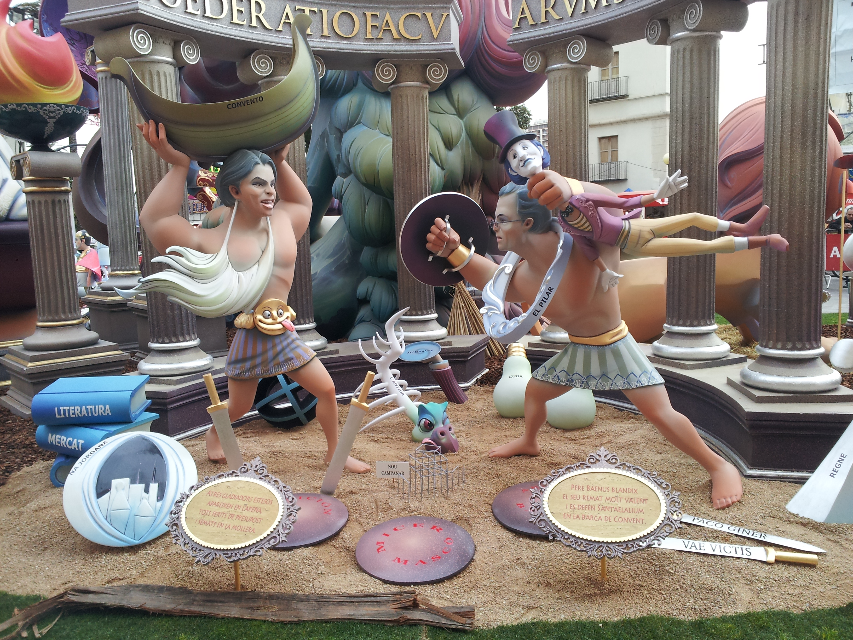 Escenes de la falla